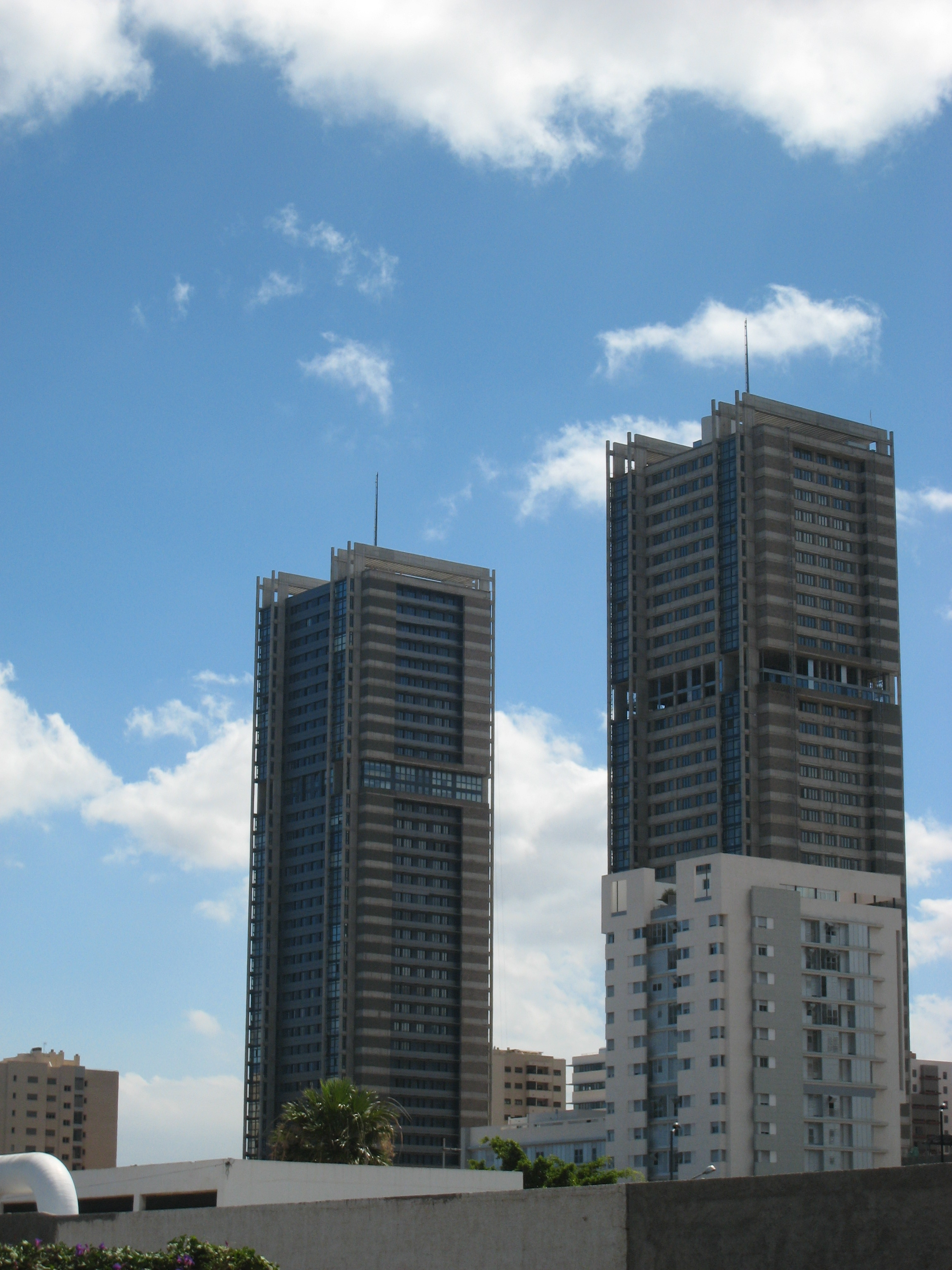 Torres de Santa Cruz de Tenerife, Canarias